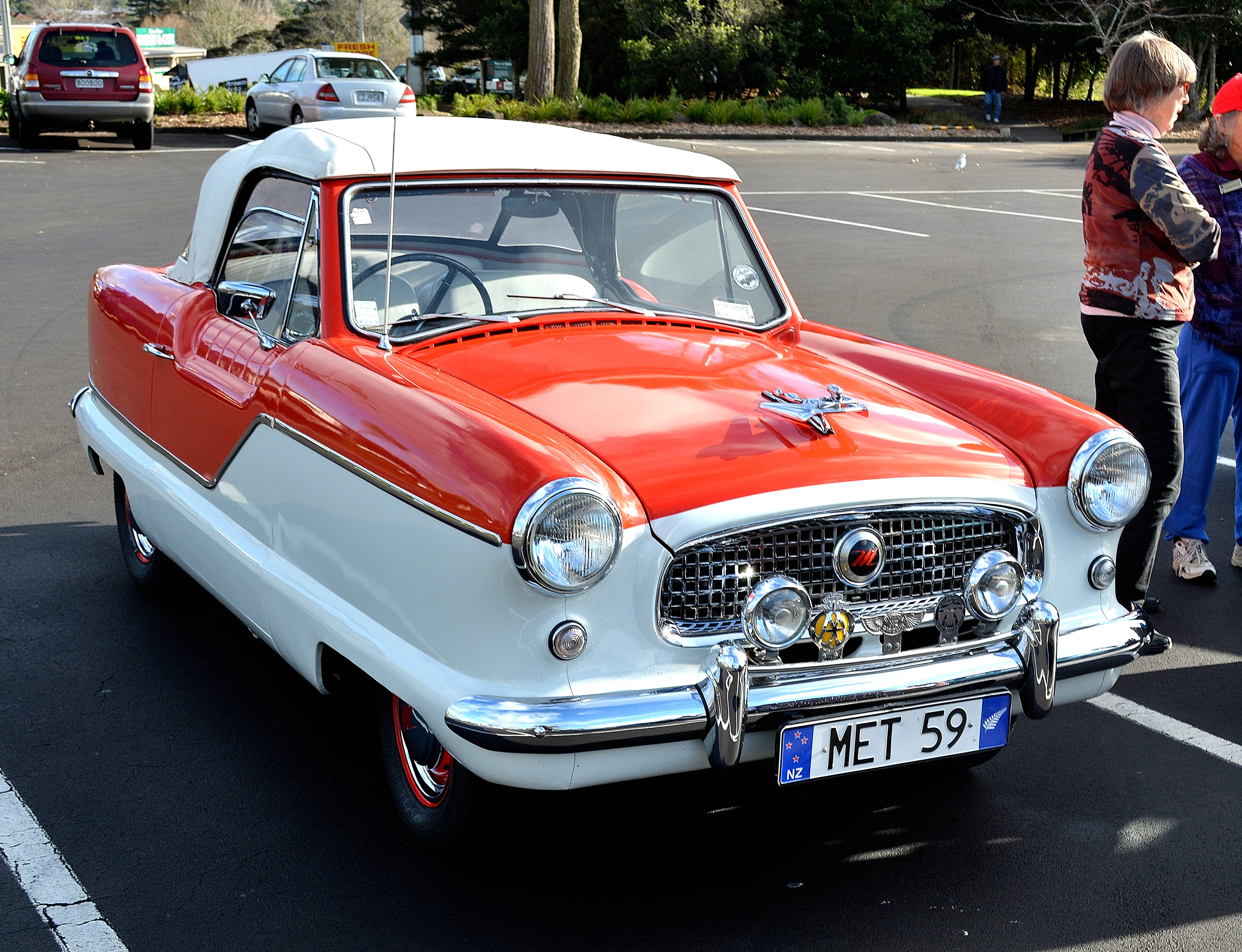 Glen Eden,West Auckland.New Zealand